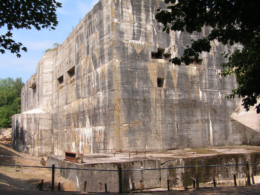 Blockhaus d'Eperlecques